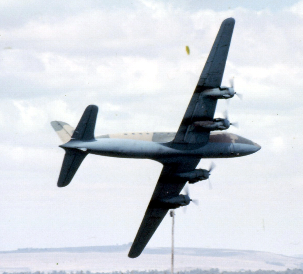 DC4 Skymaster at CFS Dunnottar during Harvard 50